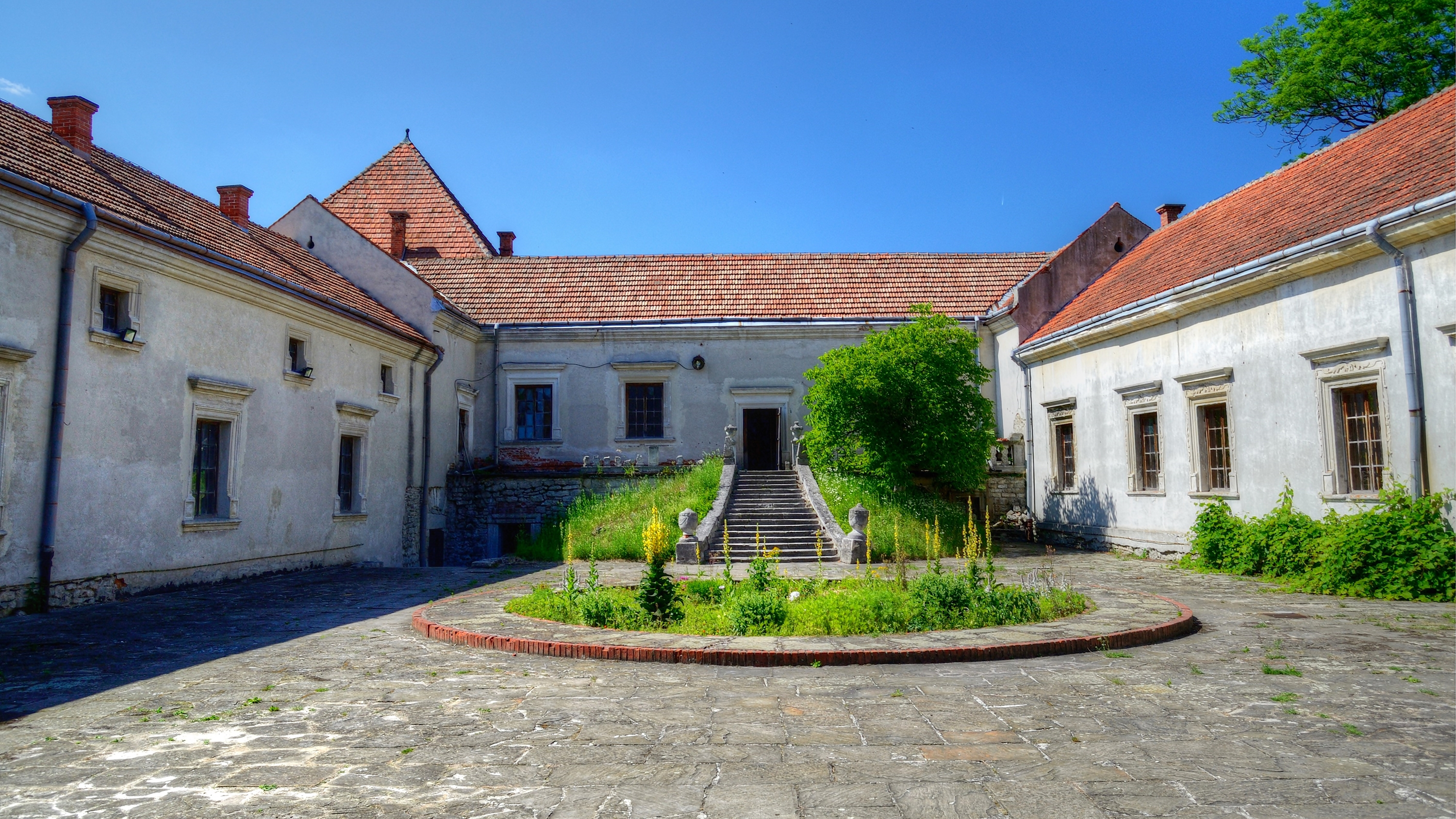 Верхнє подвіря